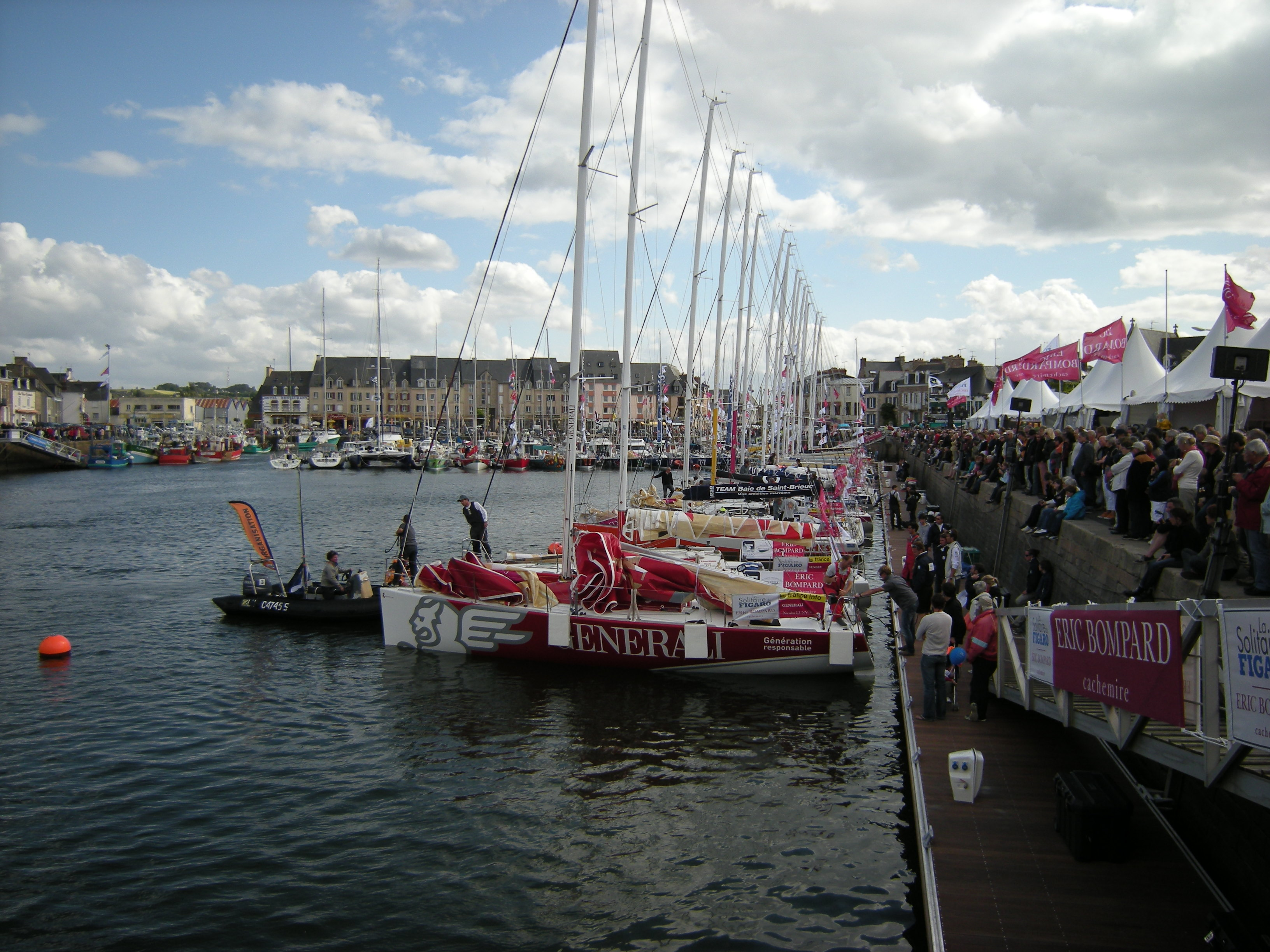 Solitaire du Figaro à Paimpol